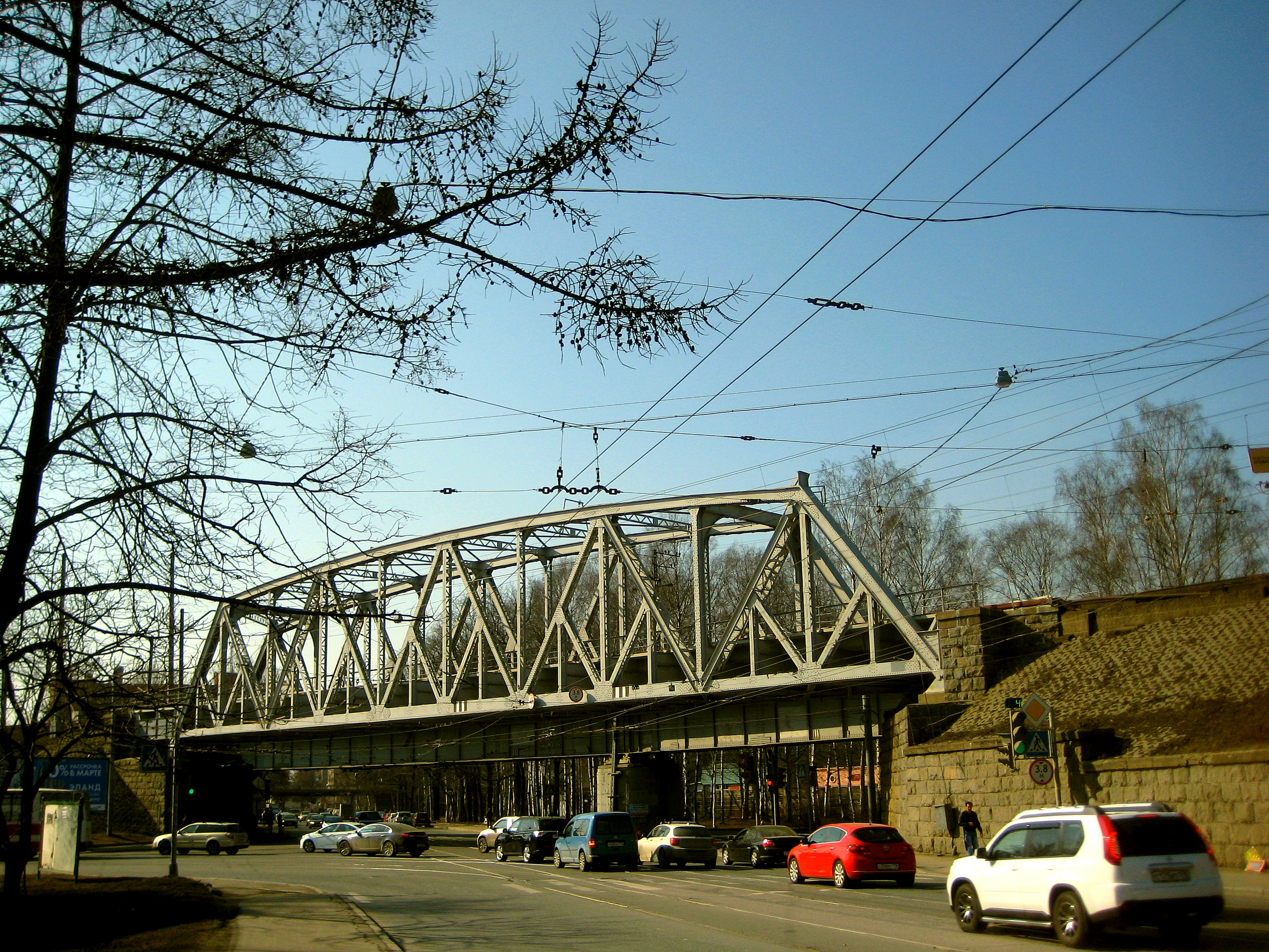 Санкт-Петербург. Железнодорожный путепровод над 1-ым Муринским проспектом на Всеволожском направлении